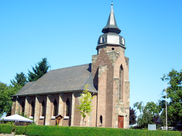 Denkmal Nr.000008 - 01